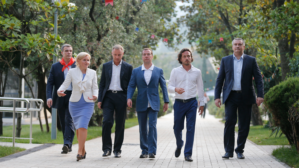 Посещение Дмитрием Медведевым международного детского центра «Артек»